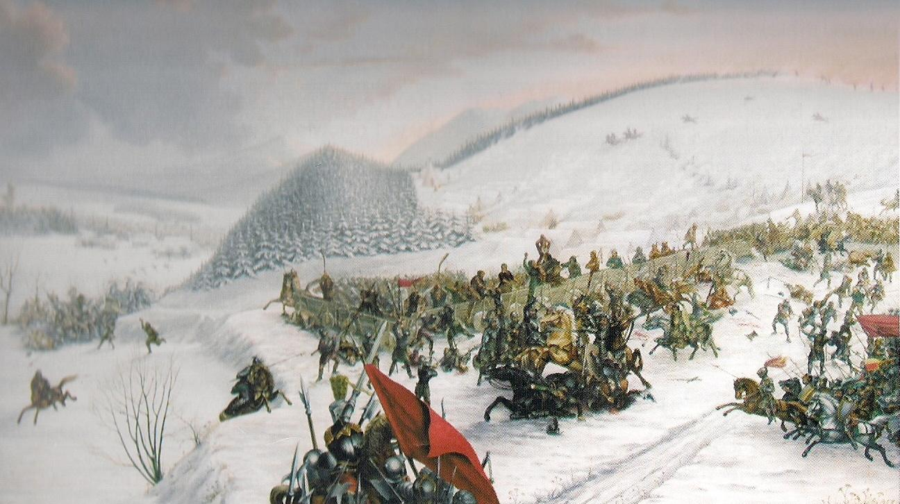 Bitwa pod Czerwoną Górą w 1428, obraz olejny Roberta Hauka